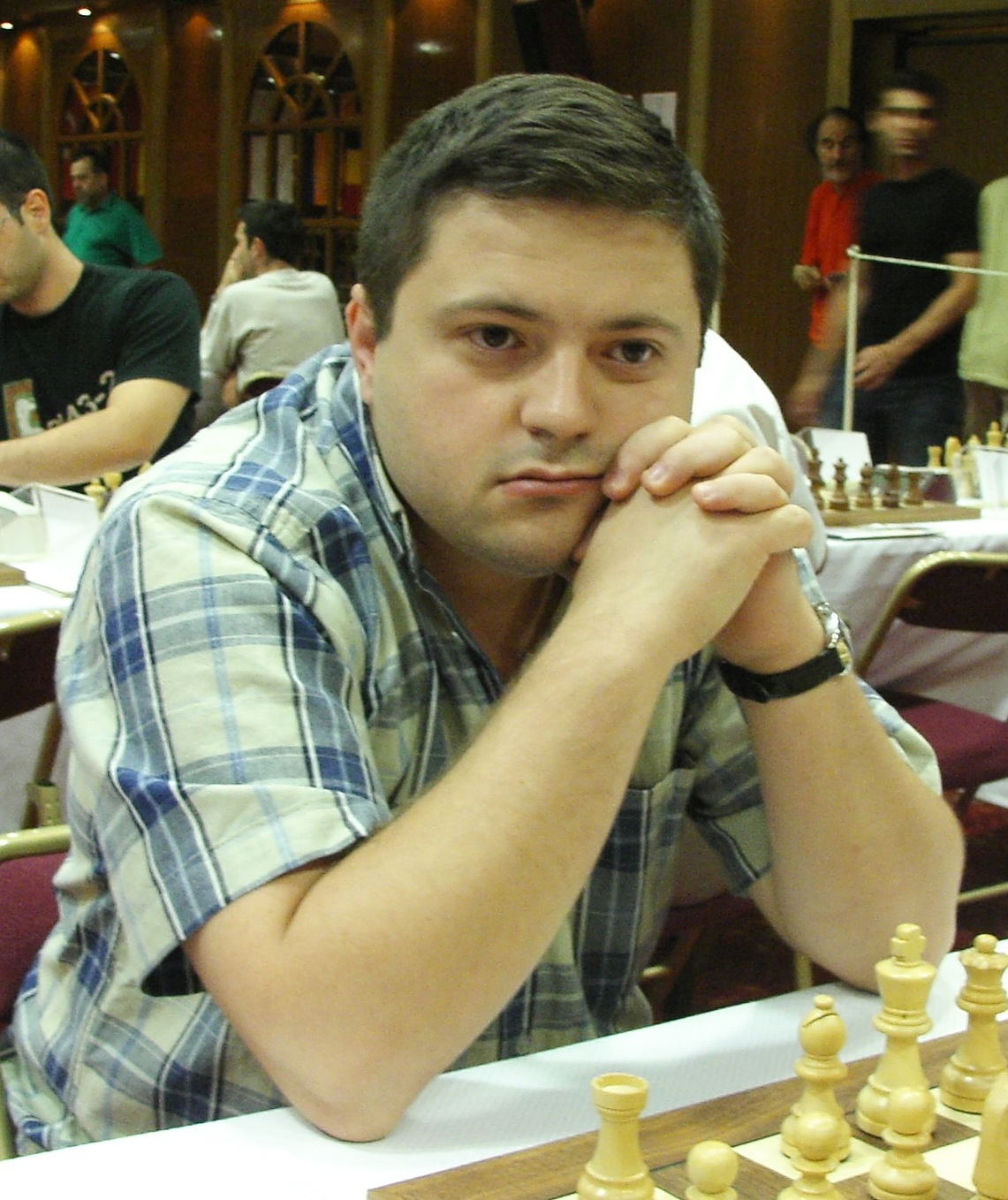 GM Tamaz Gelashvili, Georgia